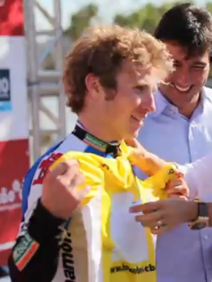 Tomas Alberio lors de la remise des maillots à la fin de la deuxième étapes du tour de Rio de Janeiro.